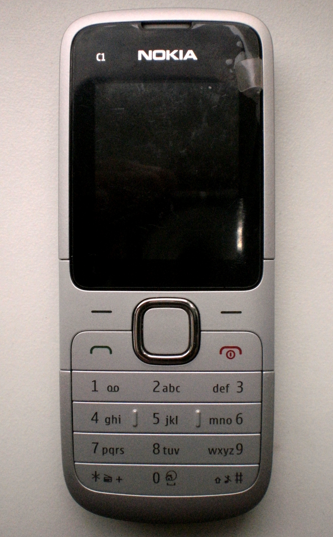 Nokia C1-01